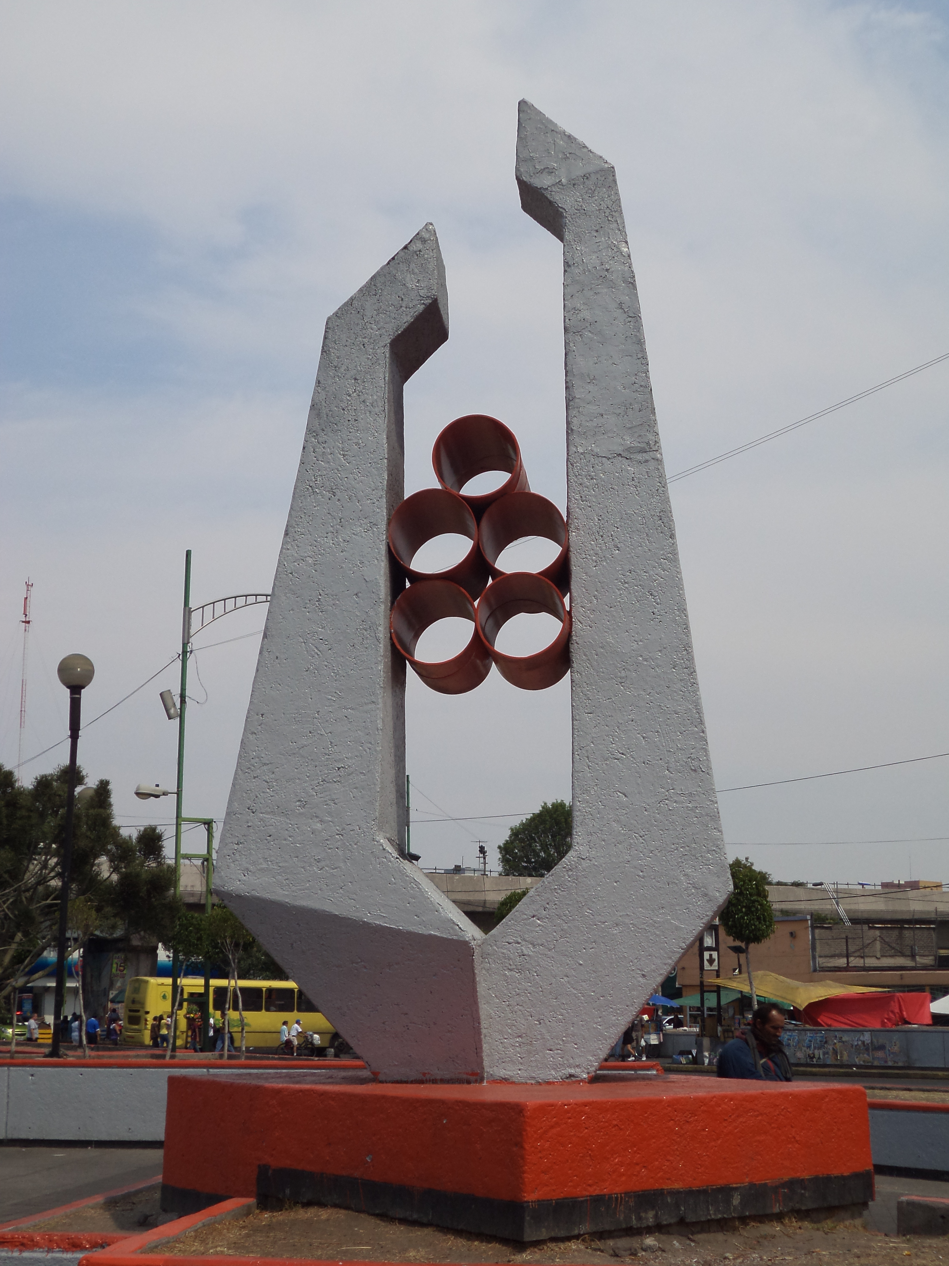 Escultura estacion jamaica